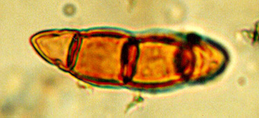 fossile Ascospore, dreifach septiert, 25 Mikrometer Länge